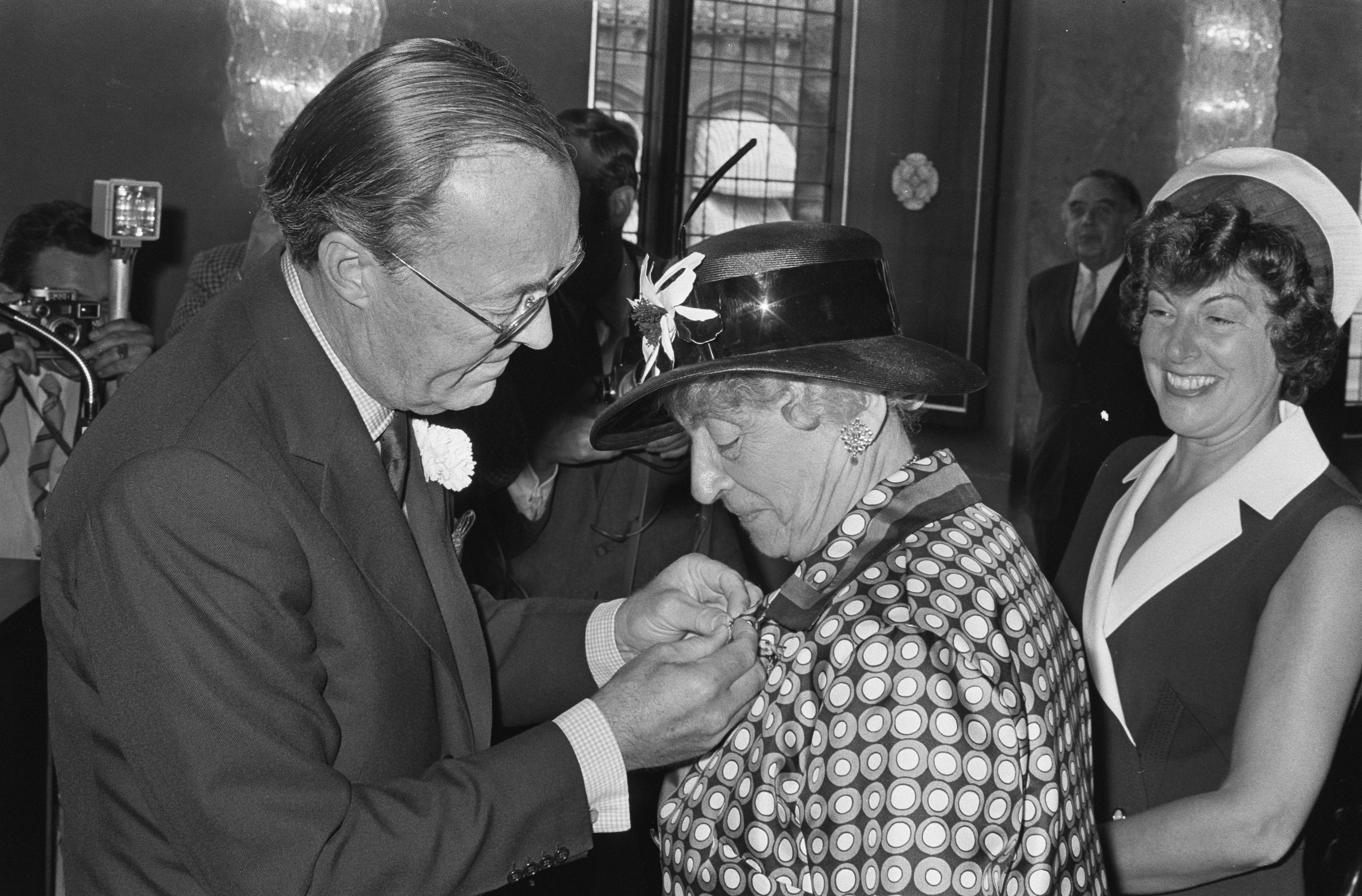 Collectie / Archief : Fotocollectie Anefo Reportage / Serie : [ onbekend ] Beschrijving : Prins Bernhard reikt Zilveren Anjers uit in Paleis op Dam , Amsterdam; Prins Bernhard speldt mevrouw H. A. Polak Schwarz versierselen op / Datum : 26 juni 1970 Locatie : Amsterdam, Noord-Holland Trefwoorden : prinsen, uitreikingen Persoonsnaam : Bernhard, prins, H. A. Polak Schwarz Instellingsnaam : Paleis op de Dam Fotograaf : Evers, Joost / Anefo Auteursrechthebbende : Nationaal Archief Materiaalsoort : Negatief (zwart/wit) Nummer archiefinventaris : bekijk toegang 2.24.01.05 Bestanddeelnummer : 923-6244